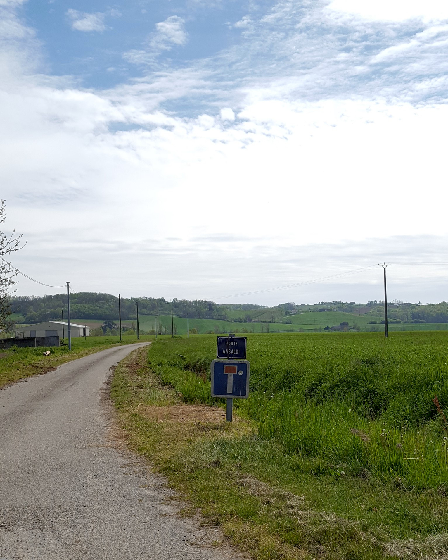 Panneau indiquant le chemin nommé en l'honneur d'Alexandre Ansaldi sur la commune de Vazerac en Tarn-et-Garonne. Cet odonyme n'est pas officiel.